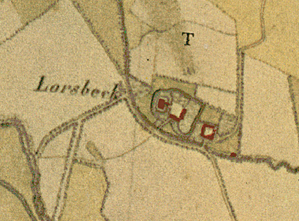 Haus und Gut Lorsbeck auf der sogenannten Tranchotkarte